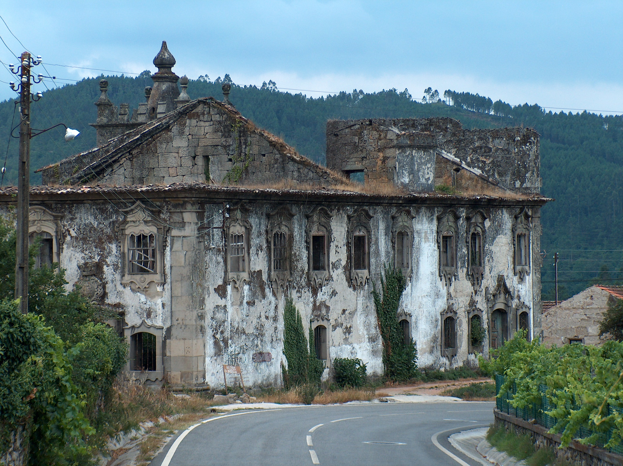 Descrição Vista geral do Solar dos Malafaias (Santa Cruz da Trapa). Fonte Carregada pelo autor Autor João Carvalho